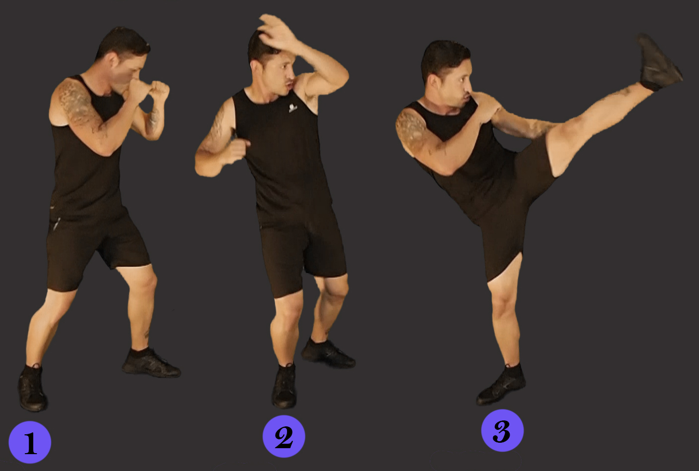 Descripción de la técnica correcta para realizar una patada circular alta